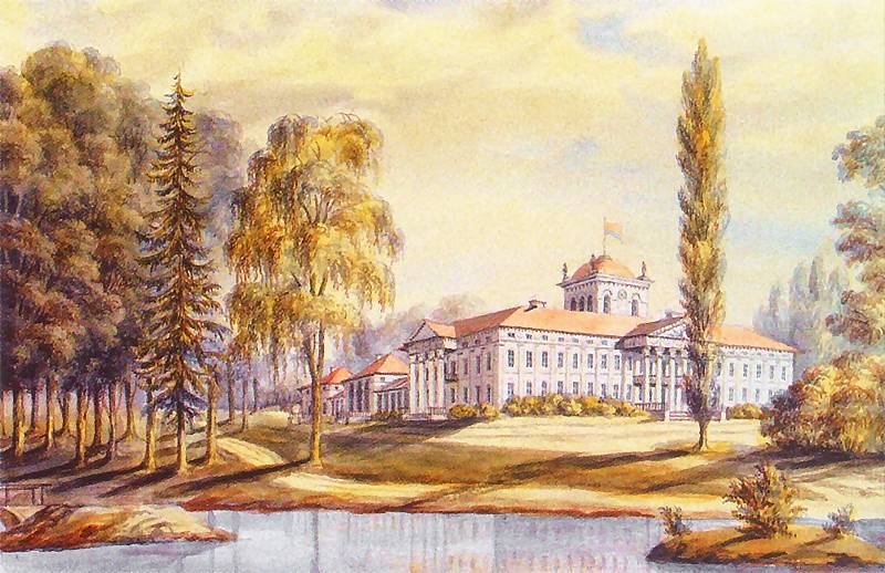 Беларуская (тарашкевіца): Сядзіба Булгакаў у Дабосьні (Жылічах)